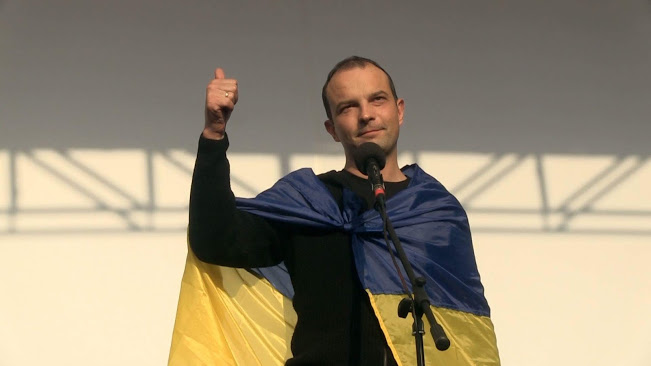 Єгор Соболєв виступає на акції "За велику політичну реформу", 2017